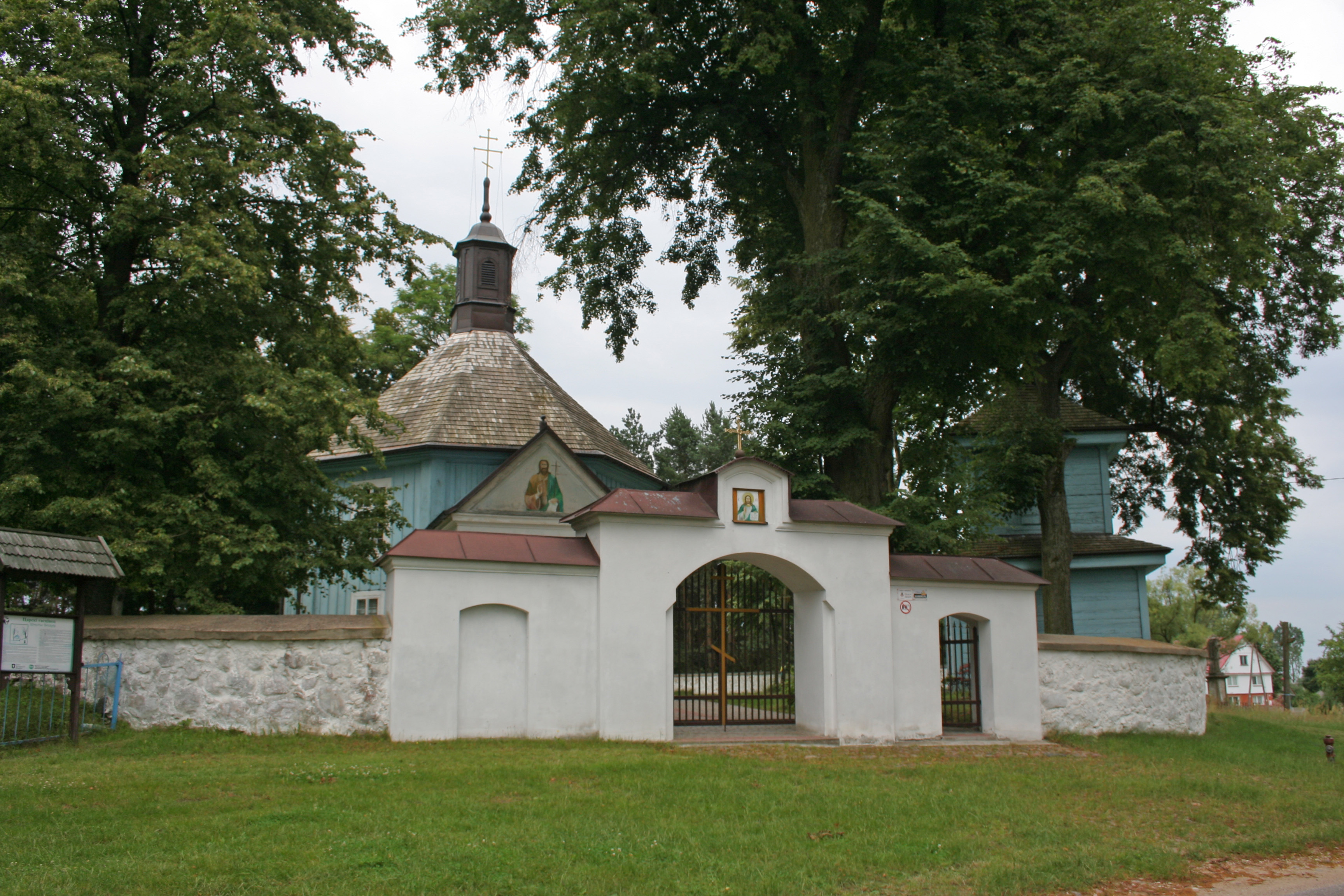 Cerkiew prawosławna (przed 1839 cerkiew greckokatolicka) pw. Ścięcia Głowy Św. Jana Chrzciciela w Szczytach-Dzięciołowie.